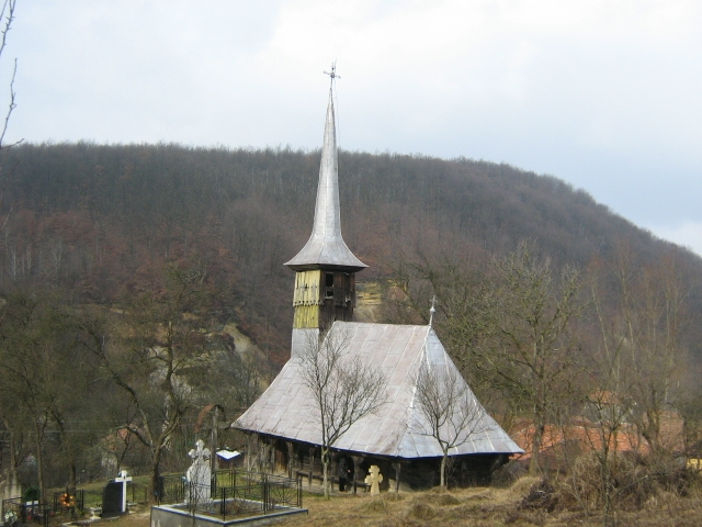 Biserica de lemn din Var, Sălaj. Foto: Mihai Petriş, februarie 2007. Categorie:Biserici de lemn din Sălaj (imagini)